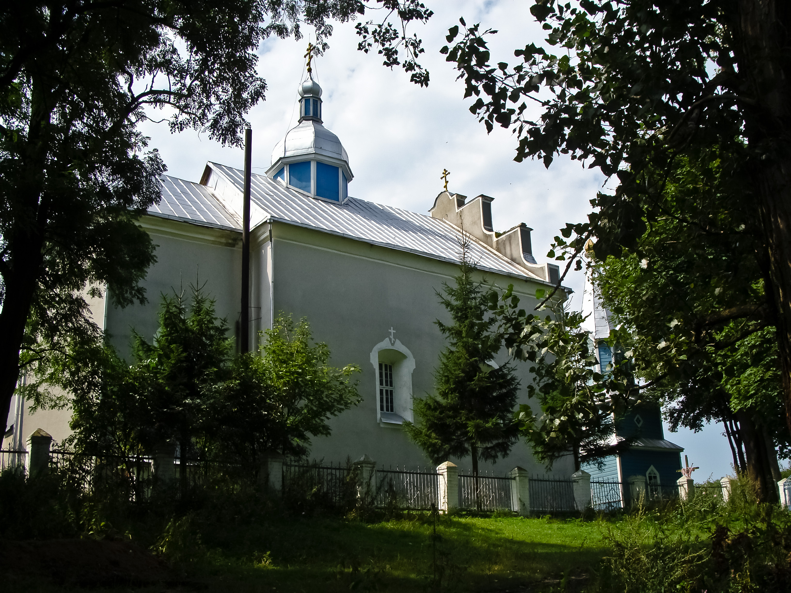 церква Преображення Господнього (Четвертня)